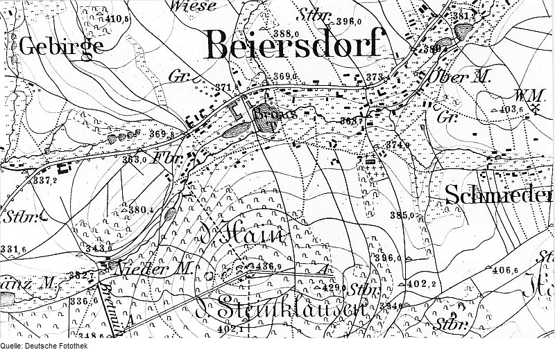 Original image description from the Deutsche Fotothek Beiersdorf. Meßtischblatt, Sekt. Neusalza, 1883